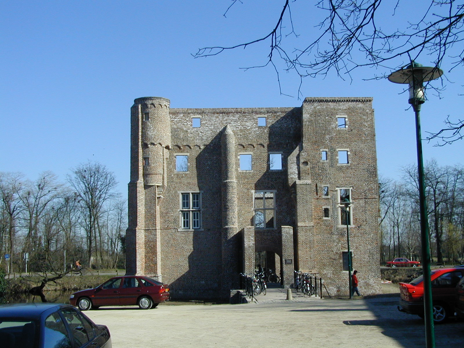 Foto zelf gemaakt op 23 maart 2003. Keunen